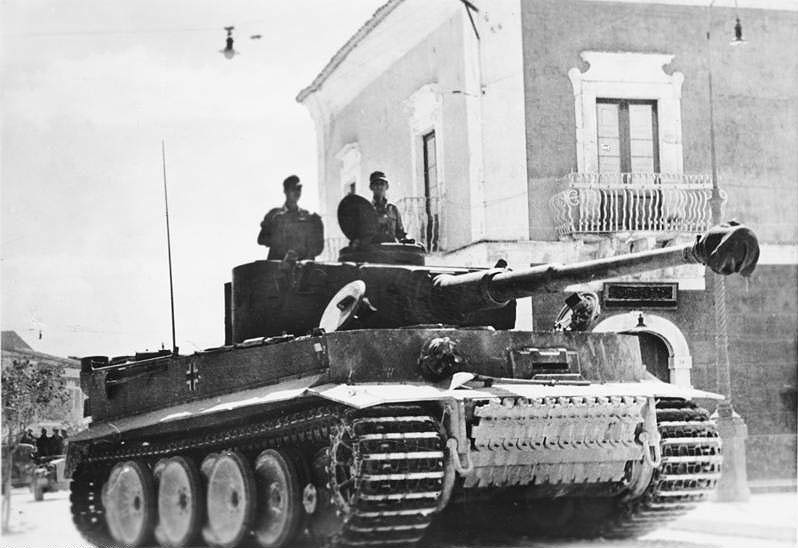 Sizilien, Panzer VI (Tiger I) "Tiger" auf Sizilien Auch auf diesem Kriegsschauplatz kommt ein großer Teil der schweren Verluste des Feindes an Panzern auf das Konto der deutschen "Tiger". UBz: Ein "Tiger"-Panzer erwartet in einer sizilianischen Stadt den Befehl zum Einsatz. NSKK-Kriegsberichter Esselborn 2.8.43 (3789) [Italien, Sizilien.- Panzer VI "Tiger I" in einer Stadt] Information added by Wikimedia users.Schwere Panzer-Abteilung 504 (only Tiger unit that went to Sicily, also rhomboid on hull side)[1]